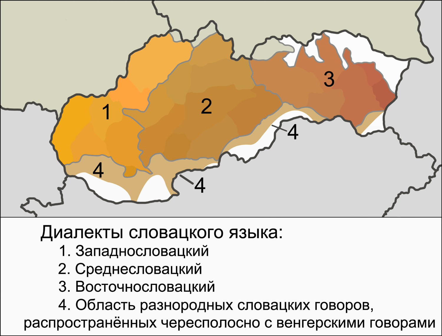 Карта словацких диалектов. Источники: Slovake.eu. Úvod. O jazyku. Nárečia Short D. Slovak // The Slavonic Languages / Edited by Comrie B., Corbett G. — London, New York: Routledge, 1993. — p. 590 (Map 10.1. The main Slovak dialects and county boundaries). — ISBN 0-415-04755-2 Лифанов К. В. Диалектология словацкого языка: Учебное пособие. — М.: Инфра-М, 2012. — С. 83 (Карта 1. Диалекты словацкого языка). — ISBN 978-5-16-005518-3 Uniza.sk. Slovenský jazyk a nárečia Slovenský ľudový umelecký kolektív. Obyvateľstvo a tradičné oblasti. Slovenčina